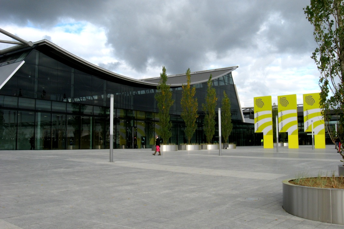 Neue Messe Stuttgart, Eingang West